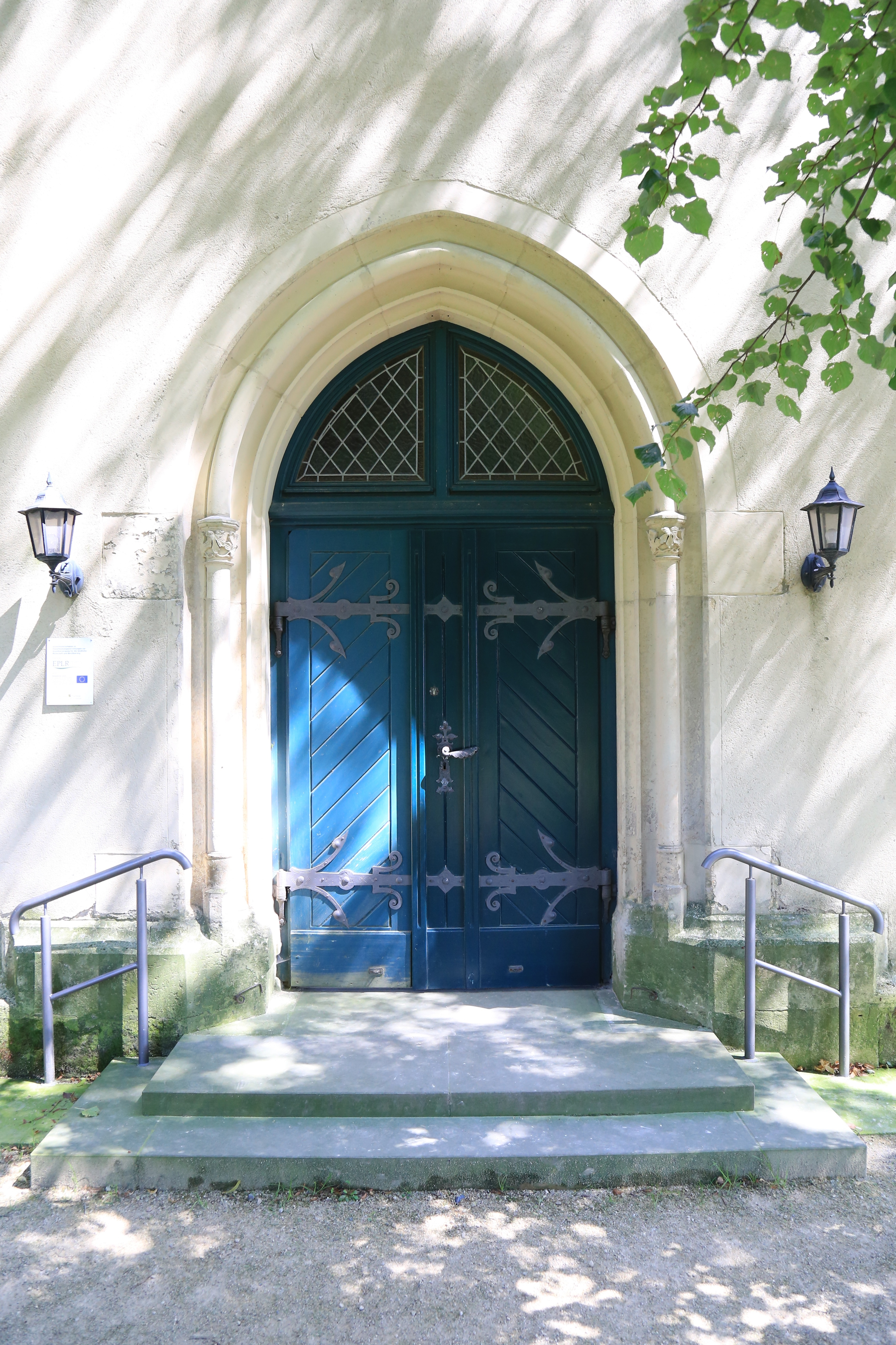 Kirche Wantewitz August 2017 (8)